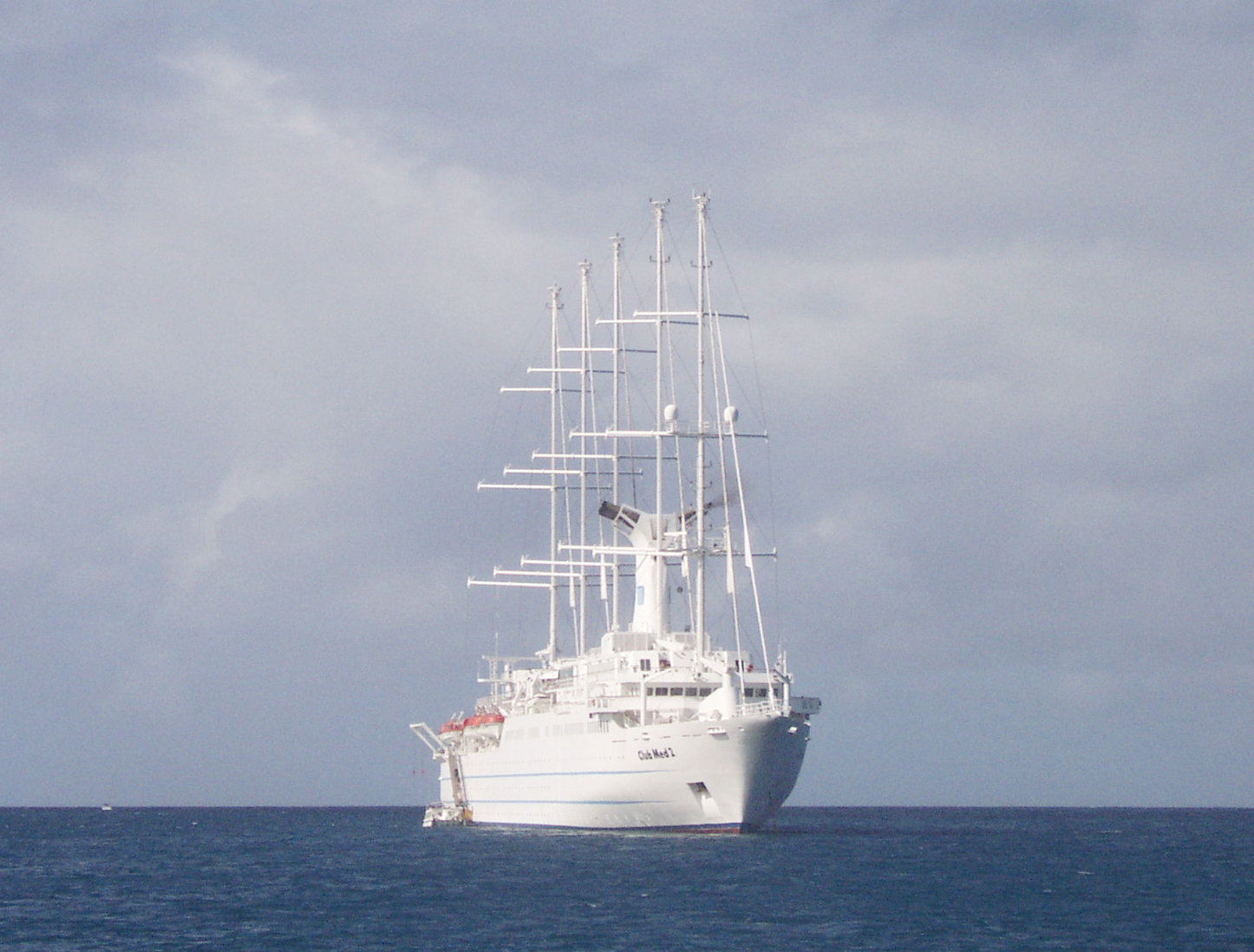 Club Med 2 aux Grenadines (Caraibes)